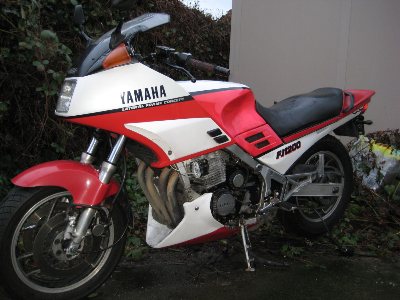 Yamaha FJ1200